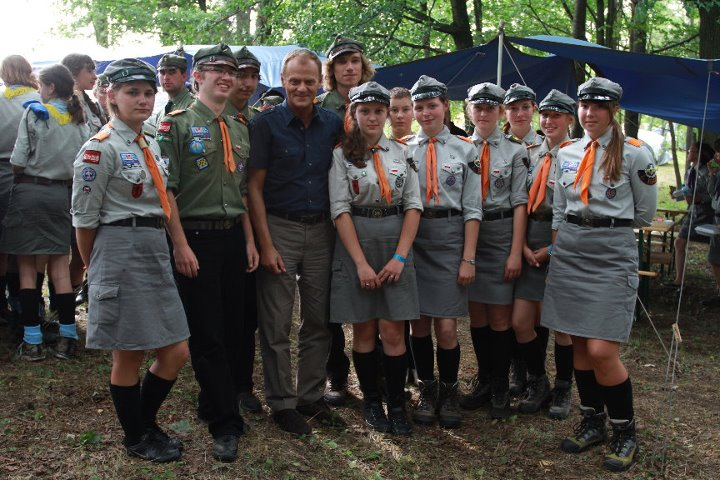 Spotkanie I KDW im. T. Rejtana z premierem podczas Zlotu Grunwaldzkiego 2011.